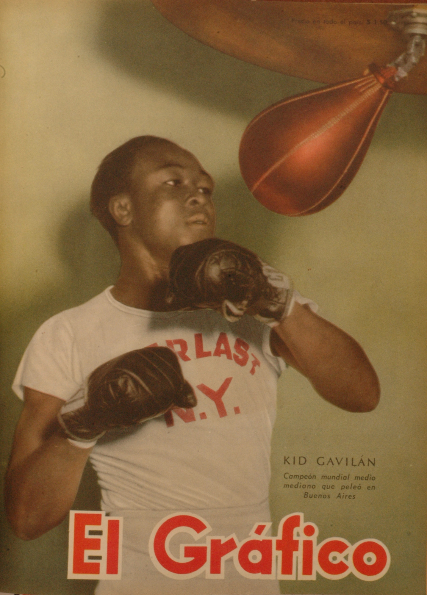 El Grafico del 12 de Septiembre de 1952. Edicion 1727